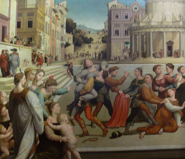 Der Raub der Dina (Genesis 34). Kunsthistorisches Museum Wien, Gemäldegalerie, Inv. Nr. 1554